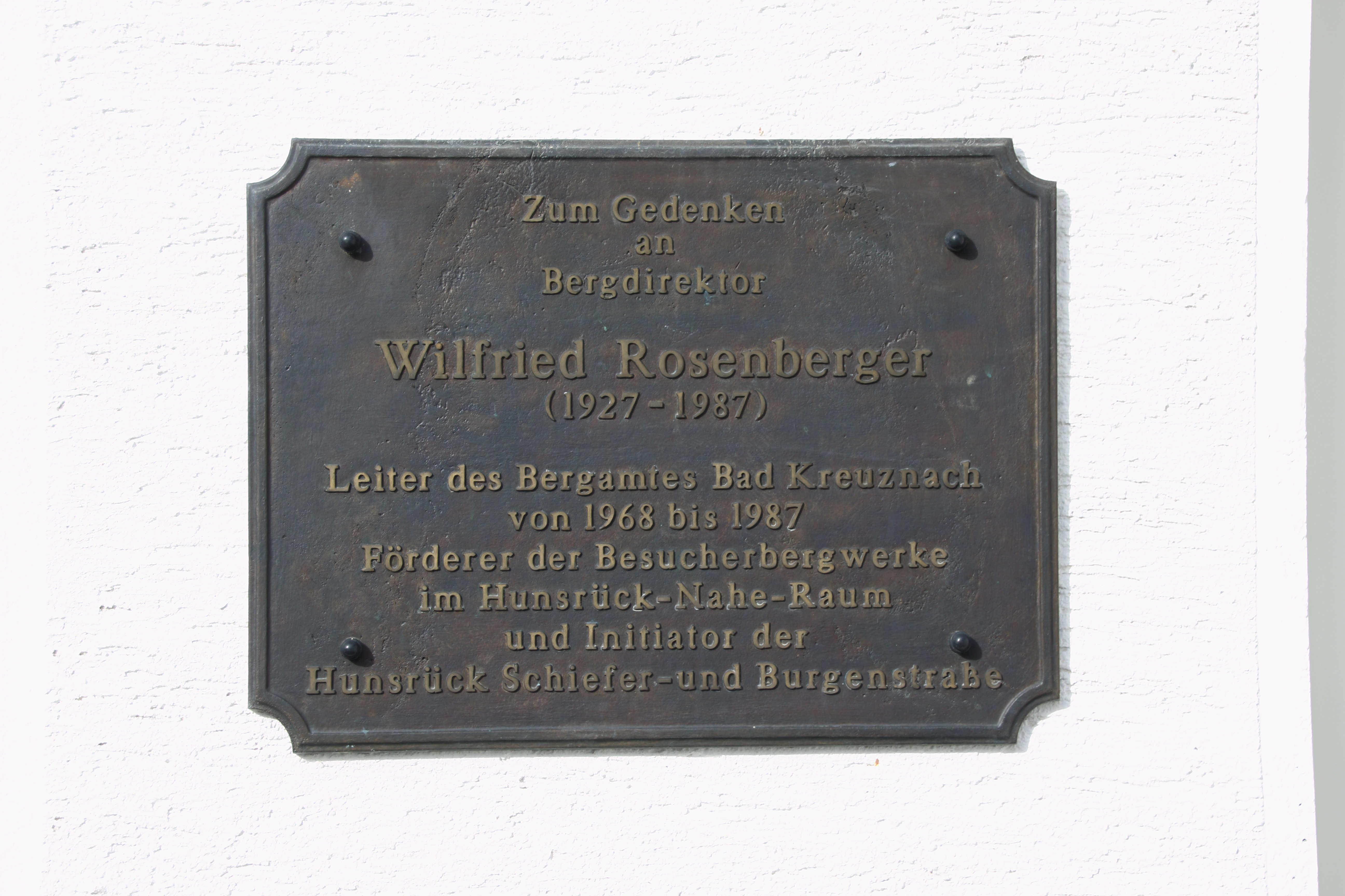 Gedenkplatte am Besucherbergwerk Schiefergrube Herrenberg: "Zum Gedenken an Bergdirektor Wilfried Rosenberger (1927-1987). Leiter des Bergamtes Bad Kreuznach von 1968 bis 1987. Förderer der Besucherbergwerke im Hunsrück-Nahe-Raum und Initiator der Hunsrück Schiefer- und Burgenstraße." Bundenbach, Rheinland-Pfalz